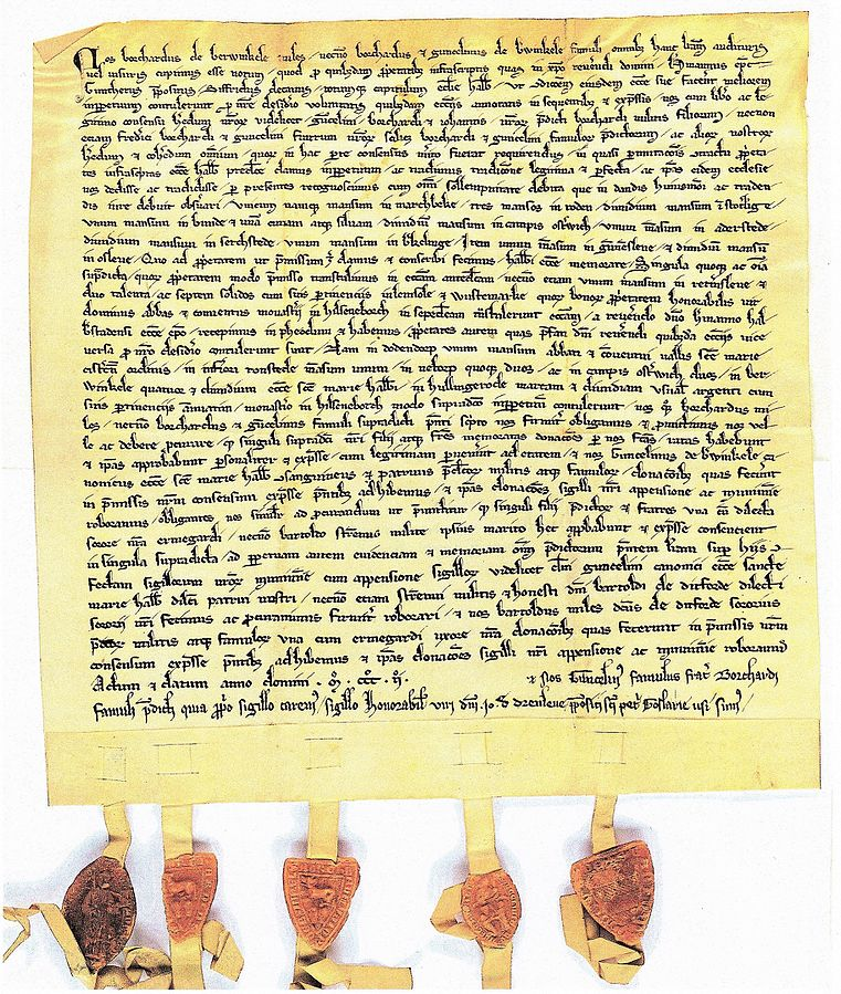 „R. Burchard von Berwinkel und seine Söhne Günzel, Burchard und Johann, und Burchards Brüder, die Knappen Burchard und Günzel, mit ihren Söhnen Friedrich, Burchard und Günzel nehmen vom Stift (Bischof Hermann, Probst Günther, Dekan Siegfried) je eine Hufe in Marbeck, Bühne, Aderstedt, Berklingen und Gunsleben, je eine halbe in Stötterlingen, Osterwieck, Sargstedt und Ausleben und 3 Hufen in Rhoden zu Lehn, die ihr freies Eigentum waren, zugleich mit 1 Hufe in Rottmersleben und 2 Talent 7 Schillingen in Lemsel und Wüstemark, die der Abt von Ilsenburg dem Stift überlässt. Dafür übereignet das Stift dem Kloster Mariental 1 Hufe in Dodendorf, dem Stift U.L. Frauen 1 Hufe in Nieder-Runstedt, 2 in Nettorf, 2 in Osterwieck, 4½ Hufen in Berwinkel, und dem Kloster Ilsenburg 1½ Mark in Hullingerode“ 1302. – Es siegeln (v.l.) Johann von Dreileben (Probst zu Sankt Petri in Goslar), Burchard, Burchard II. und ihr Oheim Günzel von Berwinkel (Kanoniker U.L. Frauen) und R. Bertold von Ditfurth, Ehemann der Ermegard, Schwester der obigen Brüder.